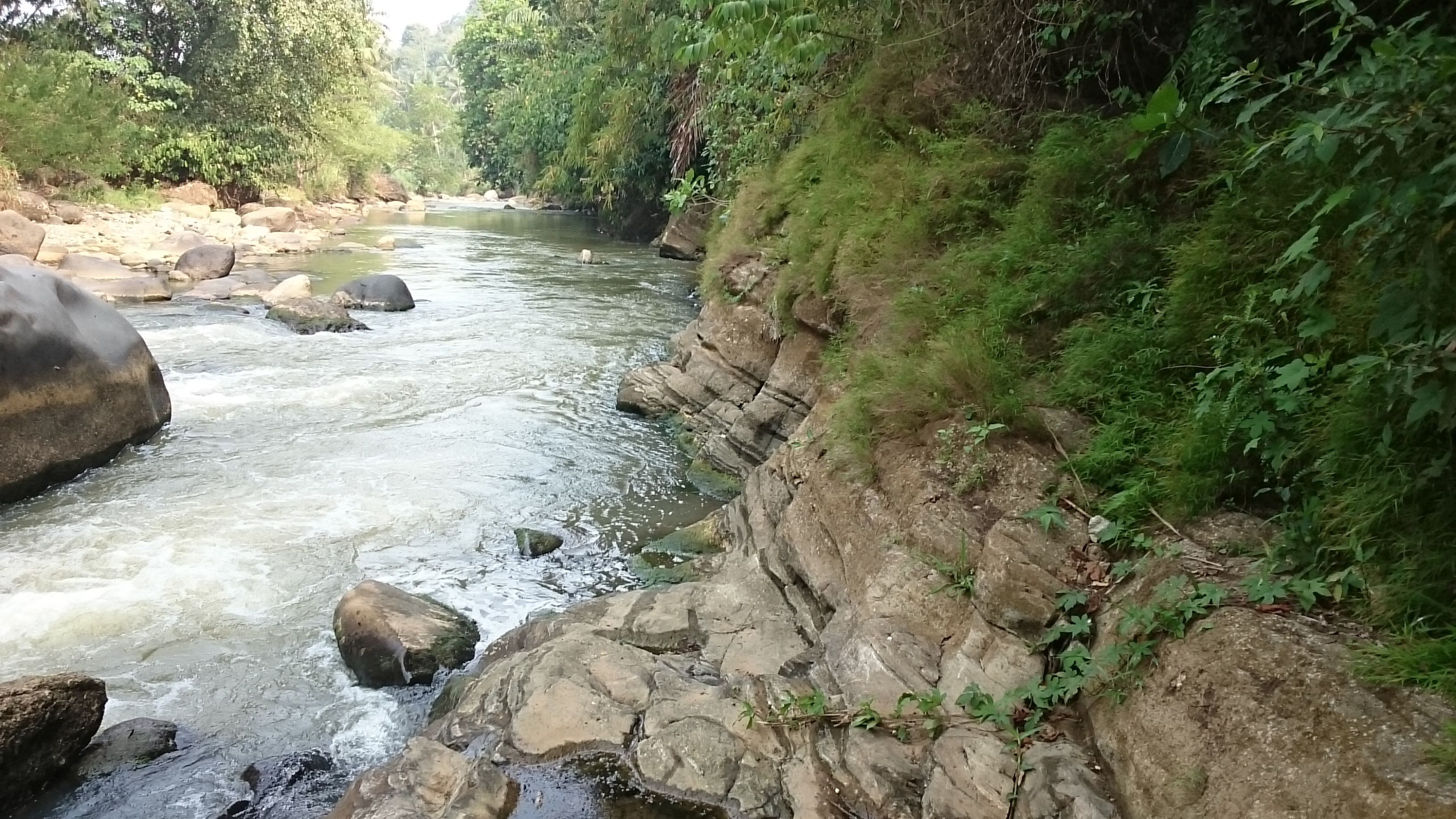 Perlapisan Batuan Sedimen di Kabupaten Sukabumi, Indonesia. Gambar diambil oleh akademisi Universitas Padjadjaran.